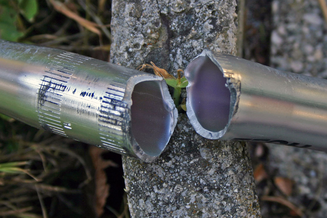 Aluminiumlenkbügel, Bruchdetail von Gebrochene-lenkstange.JPG